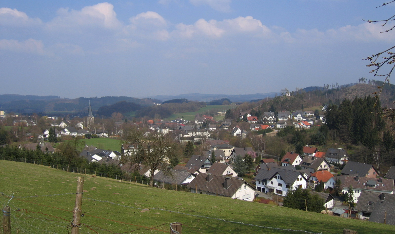 Blick vom Attenberg auf Sundern-Stockum.